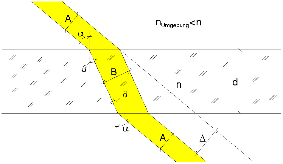 Strahlversatz durch eine Planplatte